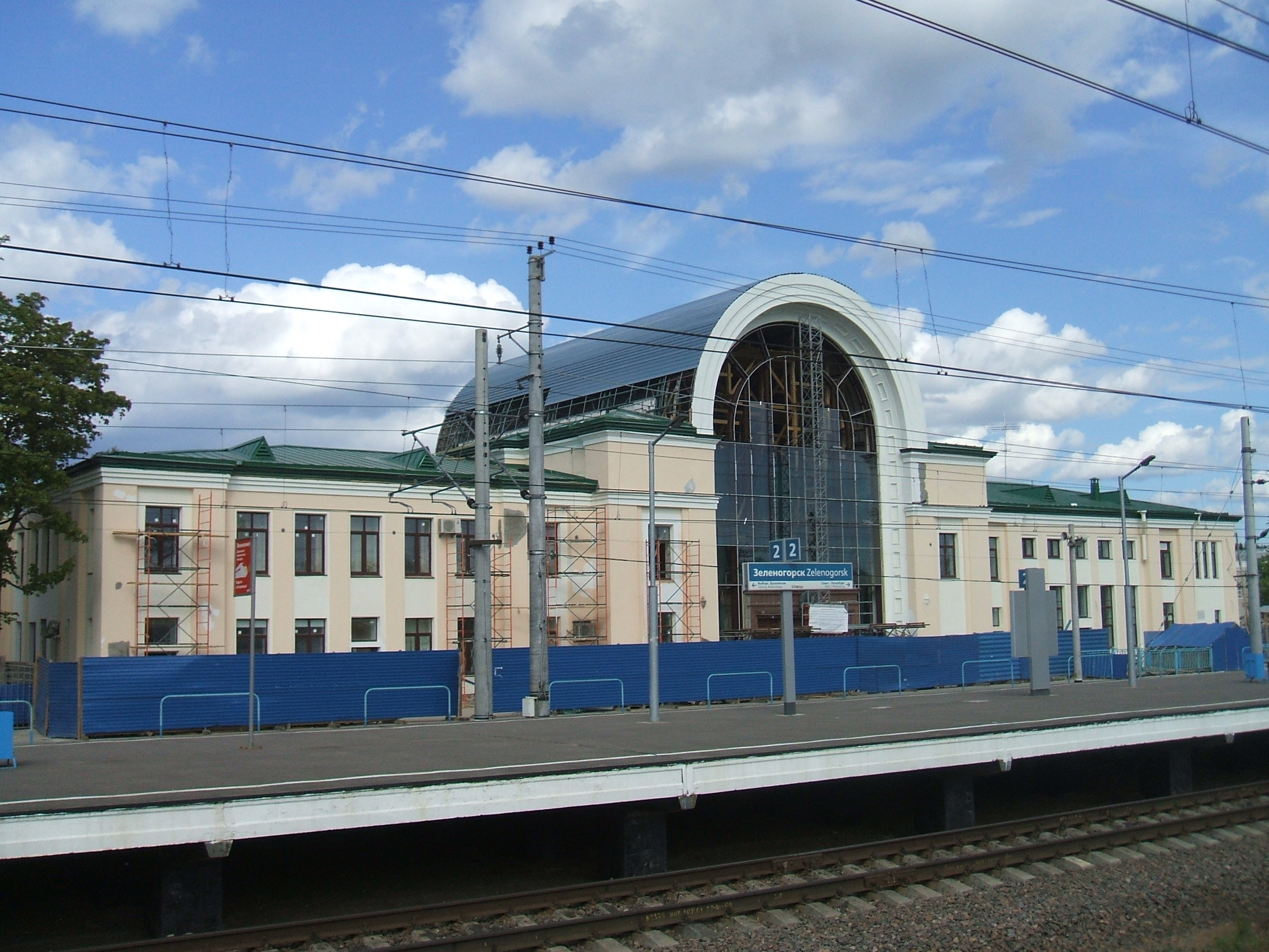 Зеленогорск СПб. Вокзал. Ремонт после пожара 2012года.